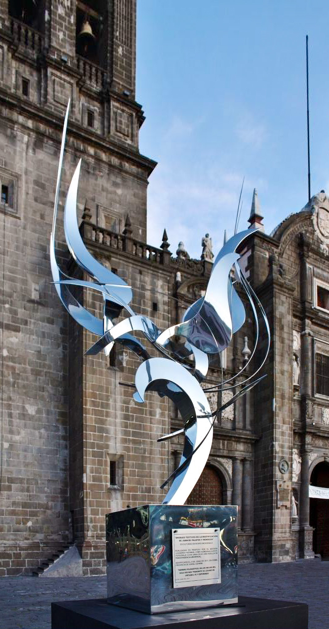 Angeles testigos de la beatificación de Juan de Palafox y Mendoza